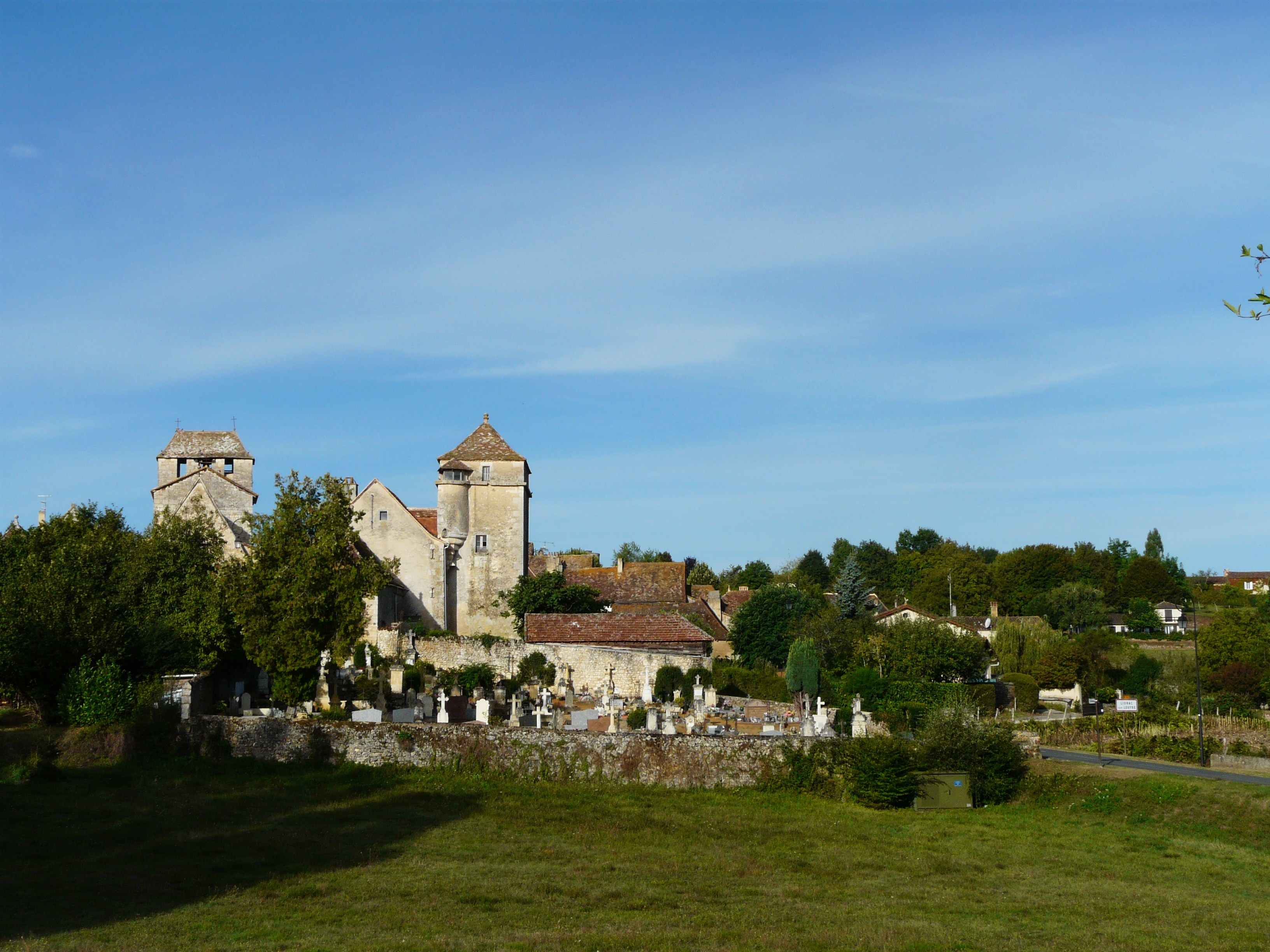 Le bourg de Liorac-sur-Louyre, Dordogne, France.